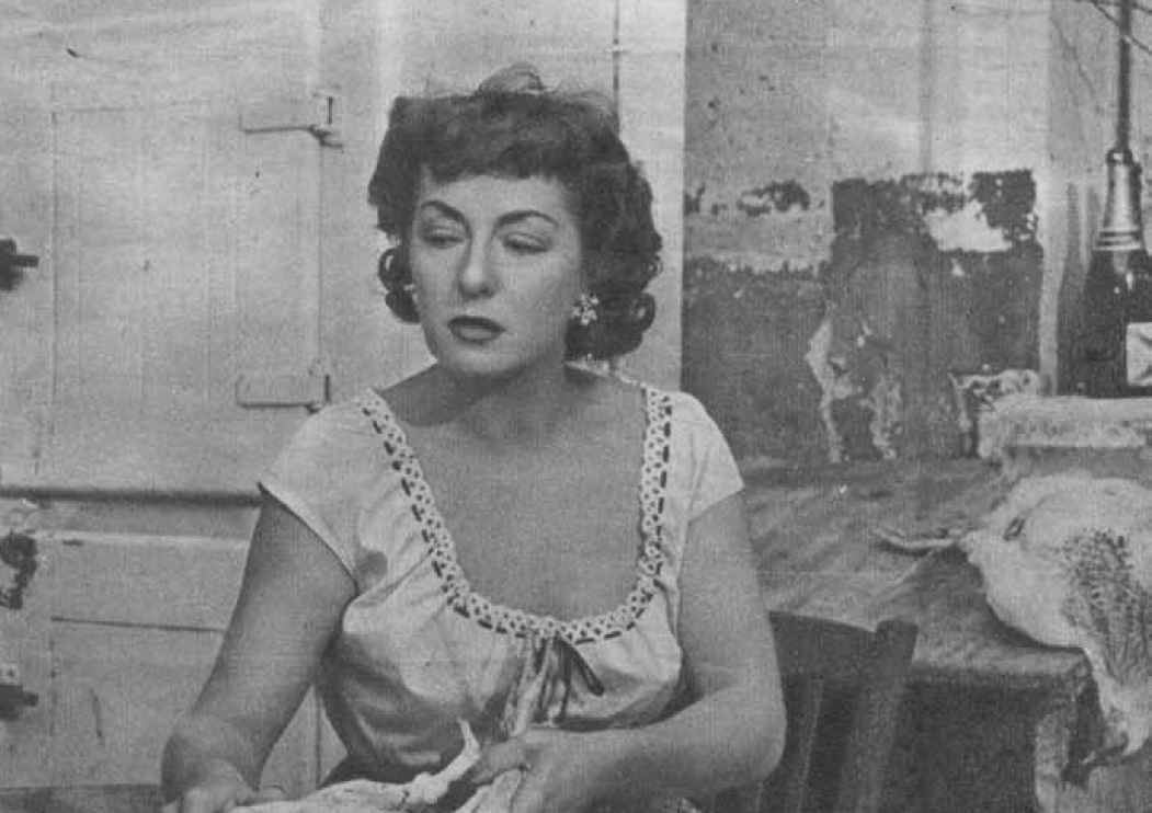 Viviane Romance nell'episodio "Lussuria" de "I 7 peccati capitali"(1952)